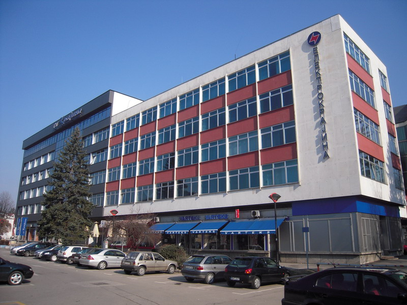 Електрокрајина и ГП Крајина (лијево)